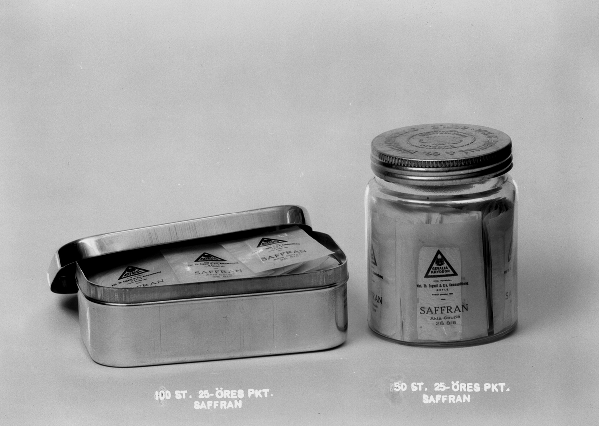 Saffran från Vict. Th. Engwall & Co, företaget bakom varumärket Gevalia. Bilden visar 100 st. 25-öres paket saffran och 50 st. 25-öres paket saffran från 1850-talet